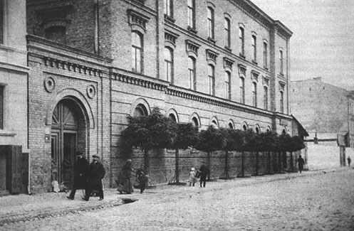 Technikum nr 7 w Warszawie